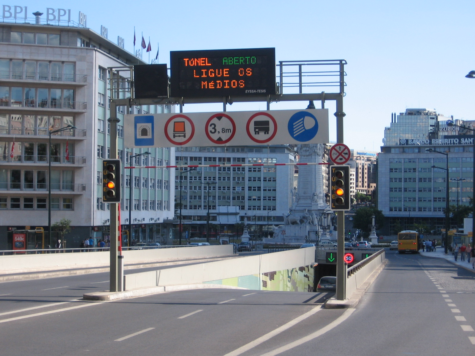 Túnel do Marquês de Pombal, Lisboa, Portugal